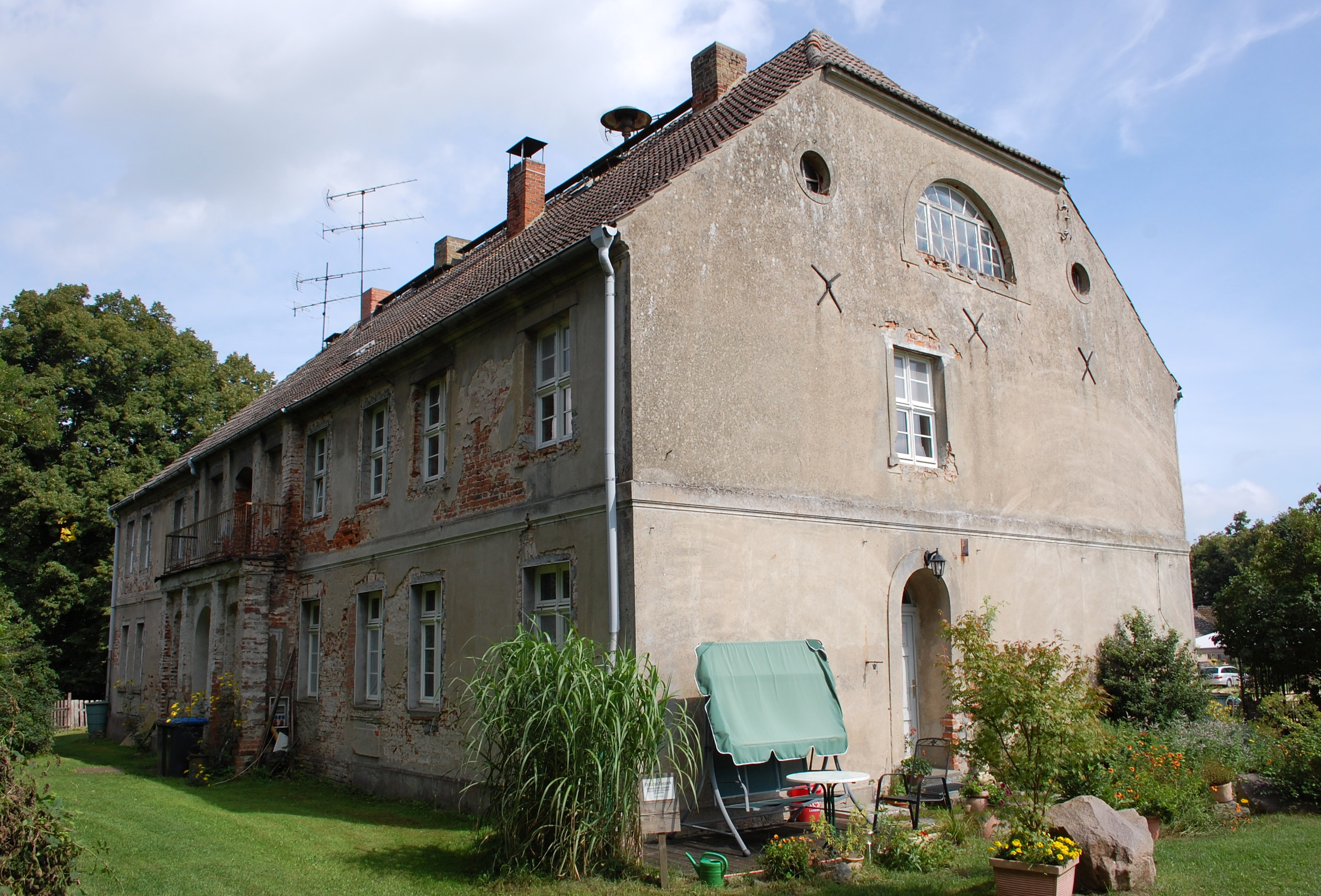 Rückseite des Gutshauses Friedenfelde